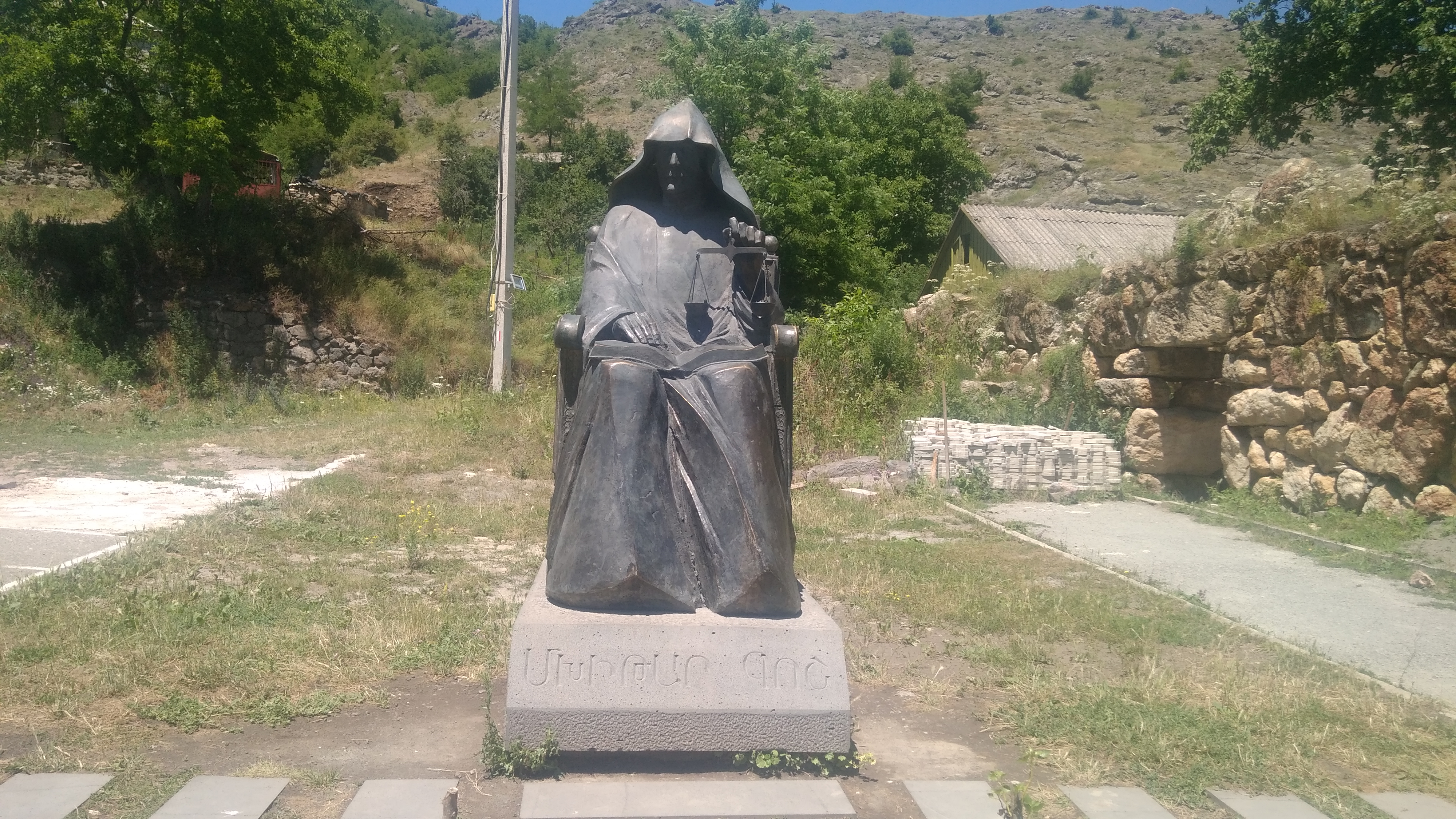 Մխիթար Գոշի արձանը Գոշավանքի մոտ